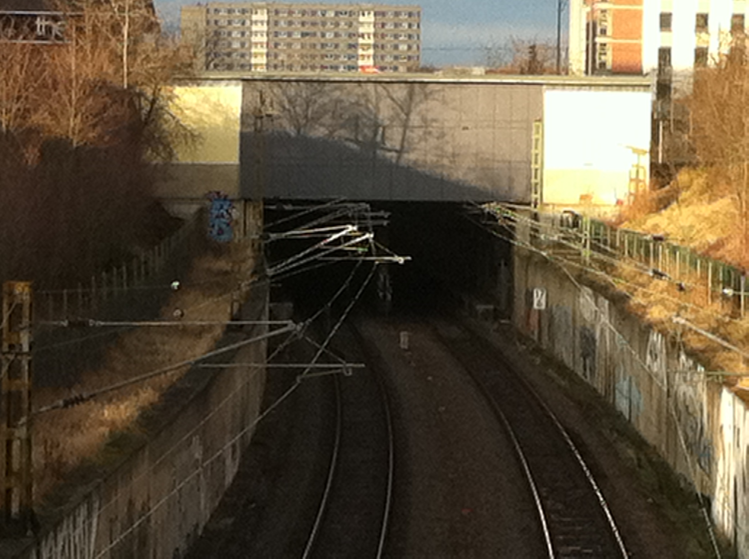 Südportal des S-Bahntunnels in Halle (Saale)